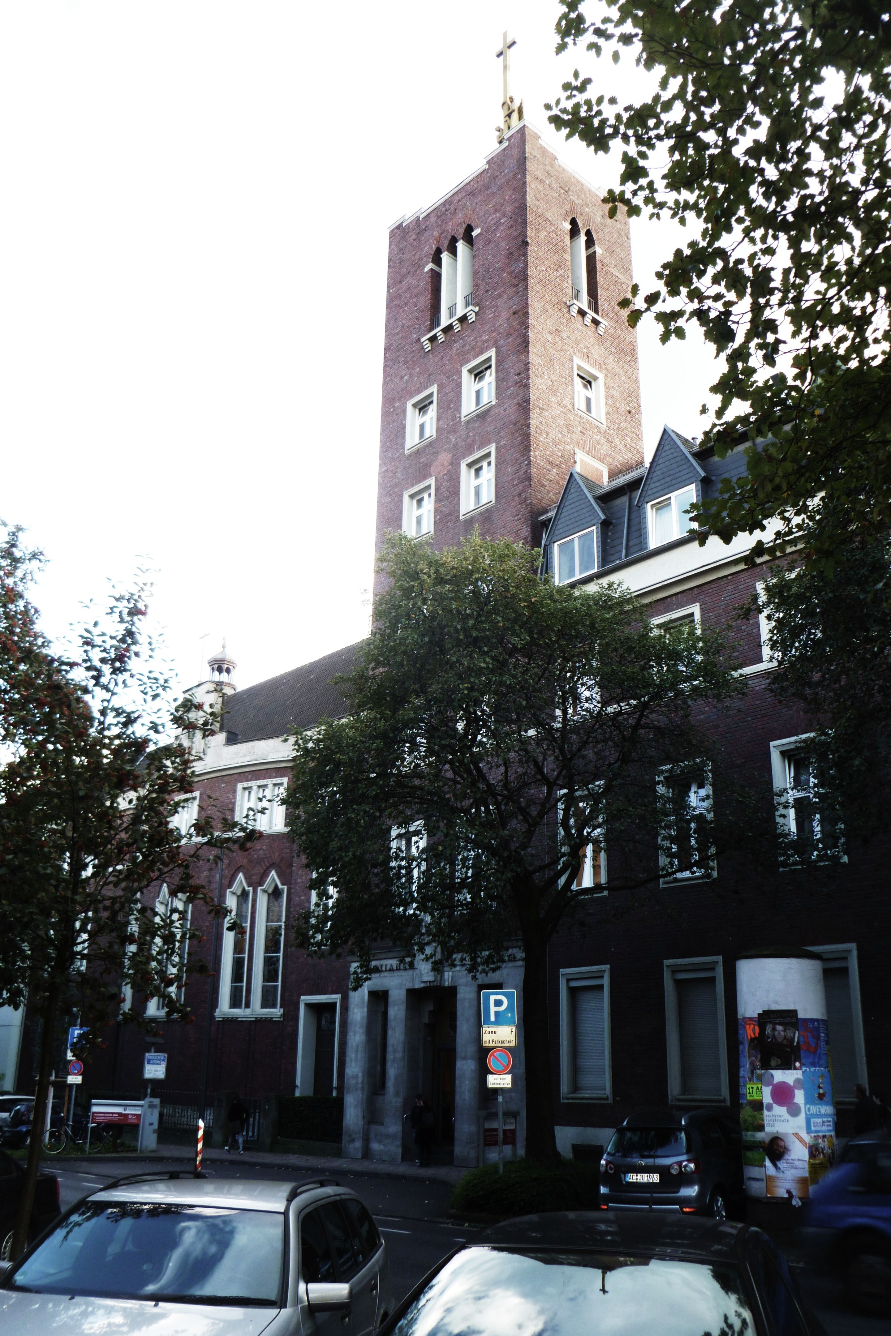 Alexianer-Kloster Aachen